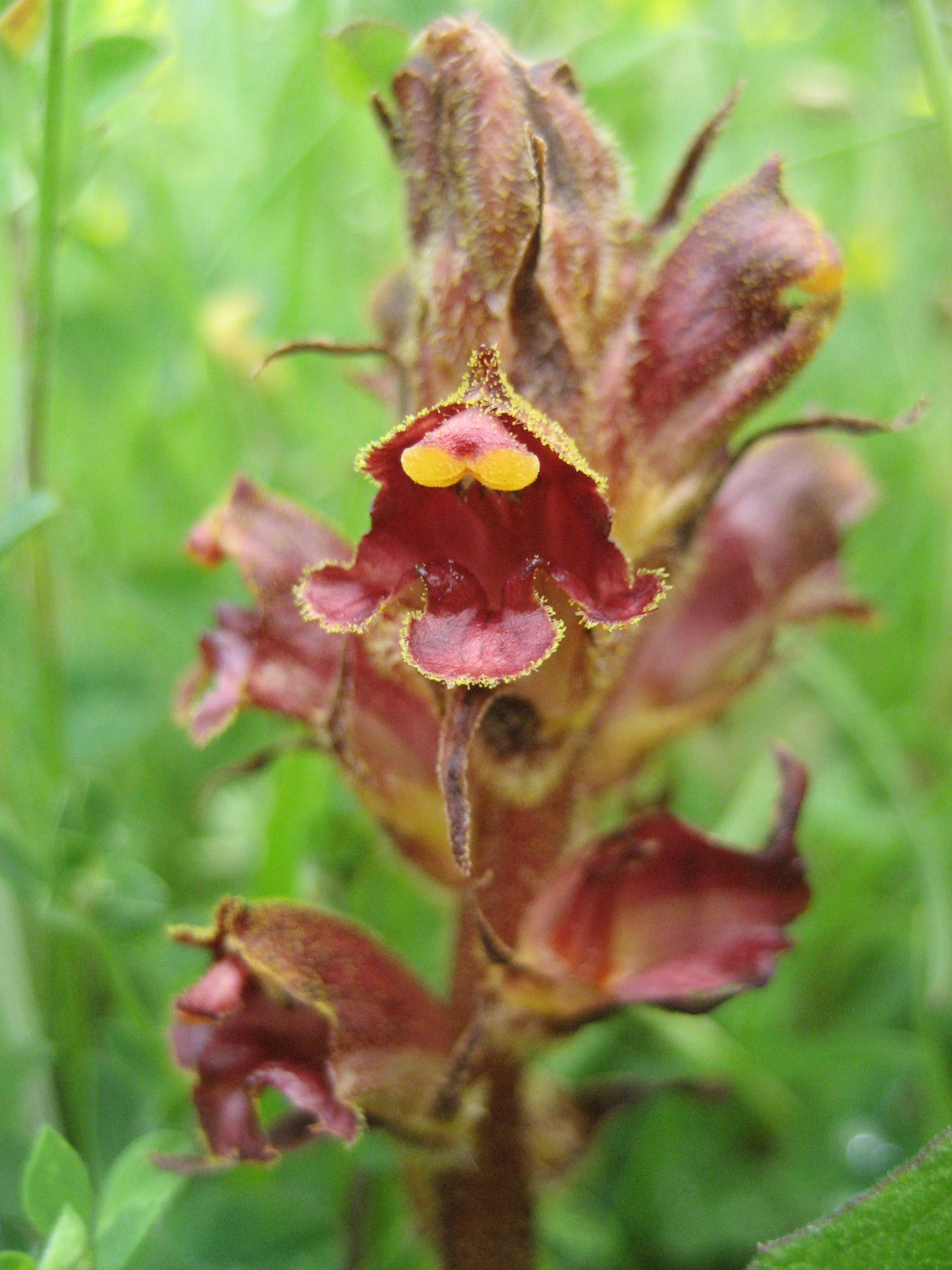 Orobanche gracilis Botanical Garden of Bezoekerscentrum Tenellaplas, Voorne-Putten, Holland.